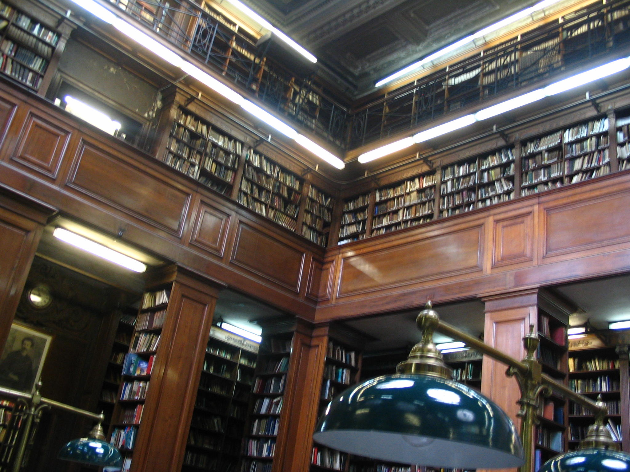 Biblioteca del Colegio Nacional de Buenos Aires.